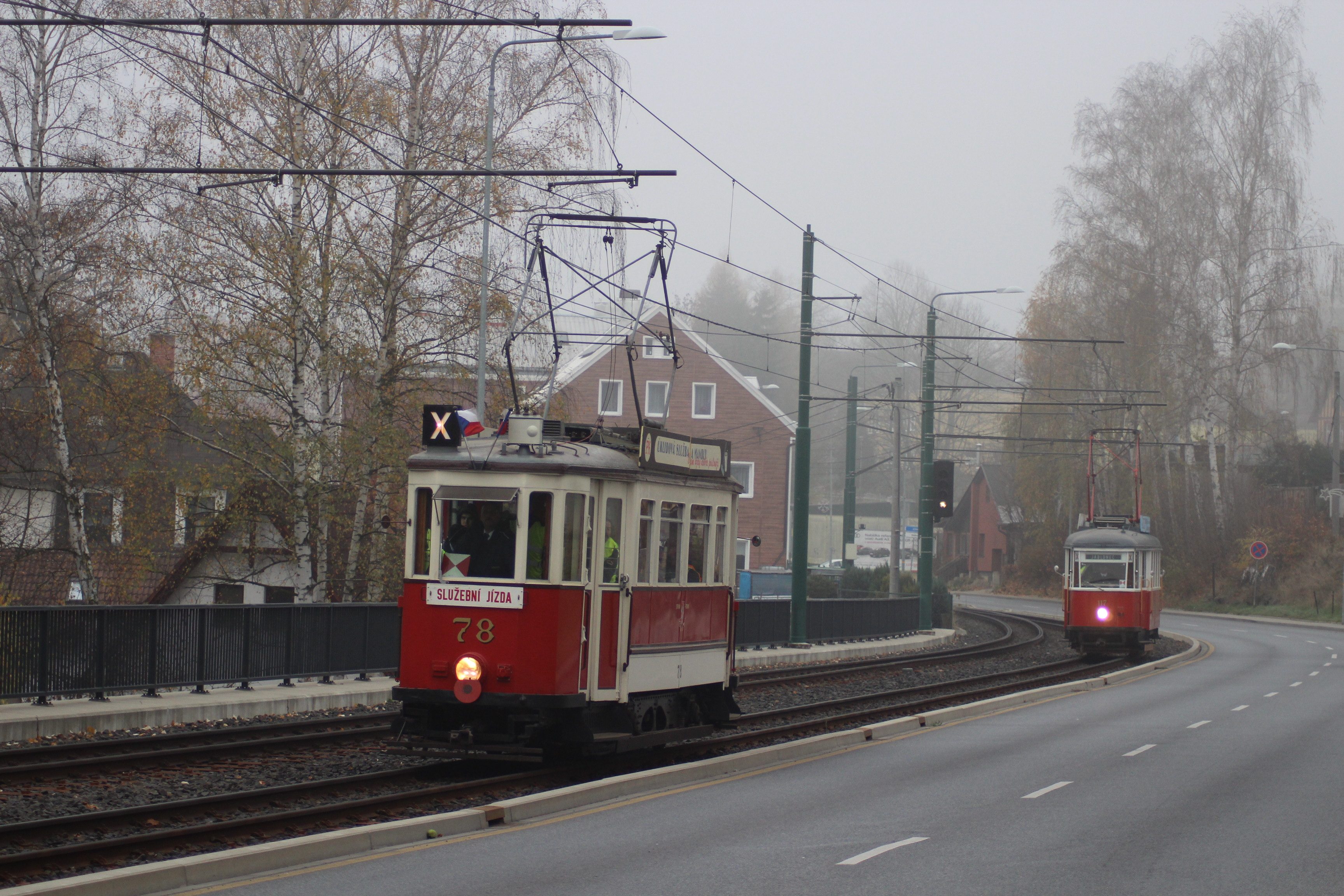 Liberecké historické tramvaje Bovera ev. č. 78 a 6MT ev. č. 117